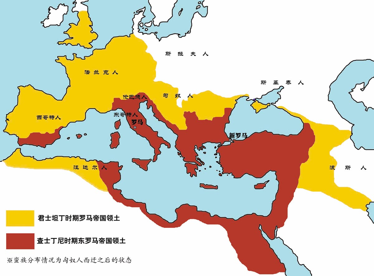 公元550年时的拜占庭帝国疆域